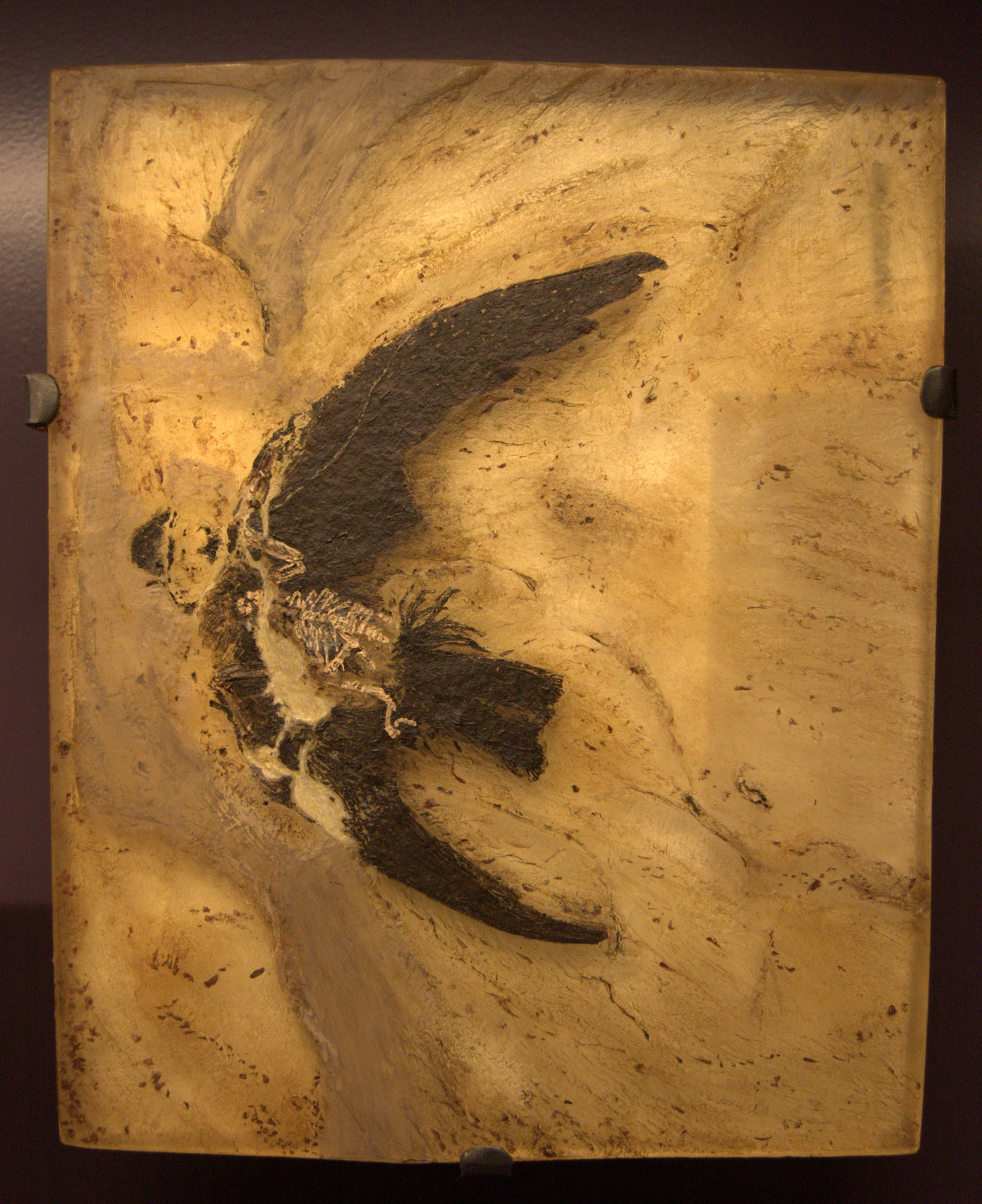 Le scaniacypselus était un oiseau insectivore que l'on peut rapprocher des martinets actuels.